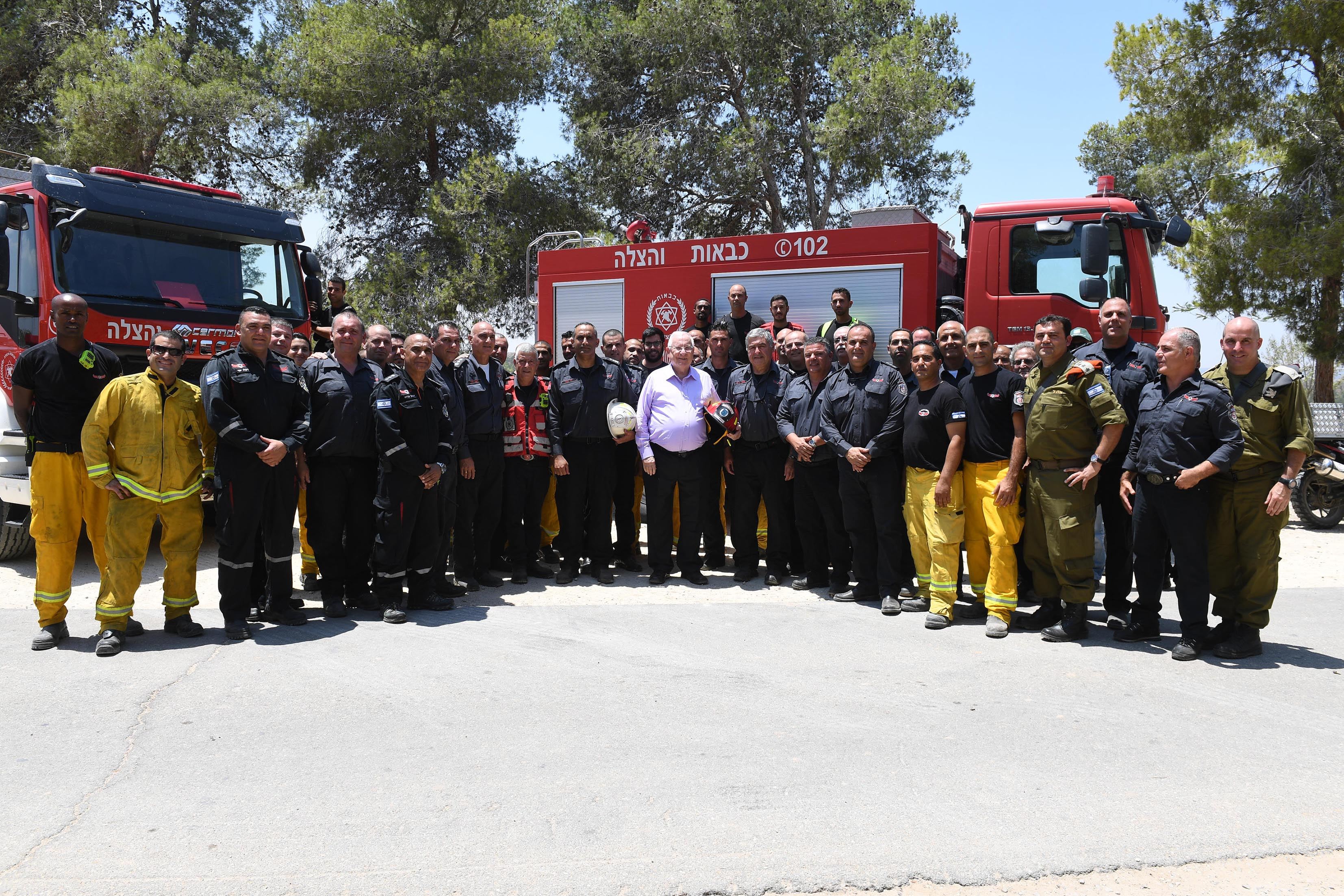 ראובן ריבלין נשיא מדינת ישראל בביקור באזור עוטף עזה יחד עם לוחמי האש (כבאים) הנלחמים בשריפות שמקורן במשלוח בלוני האש מרצועת עזה